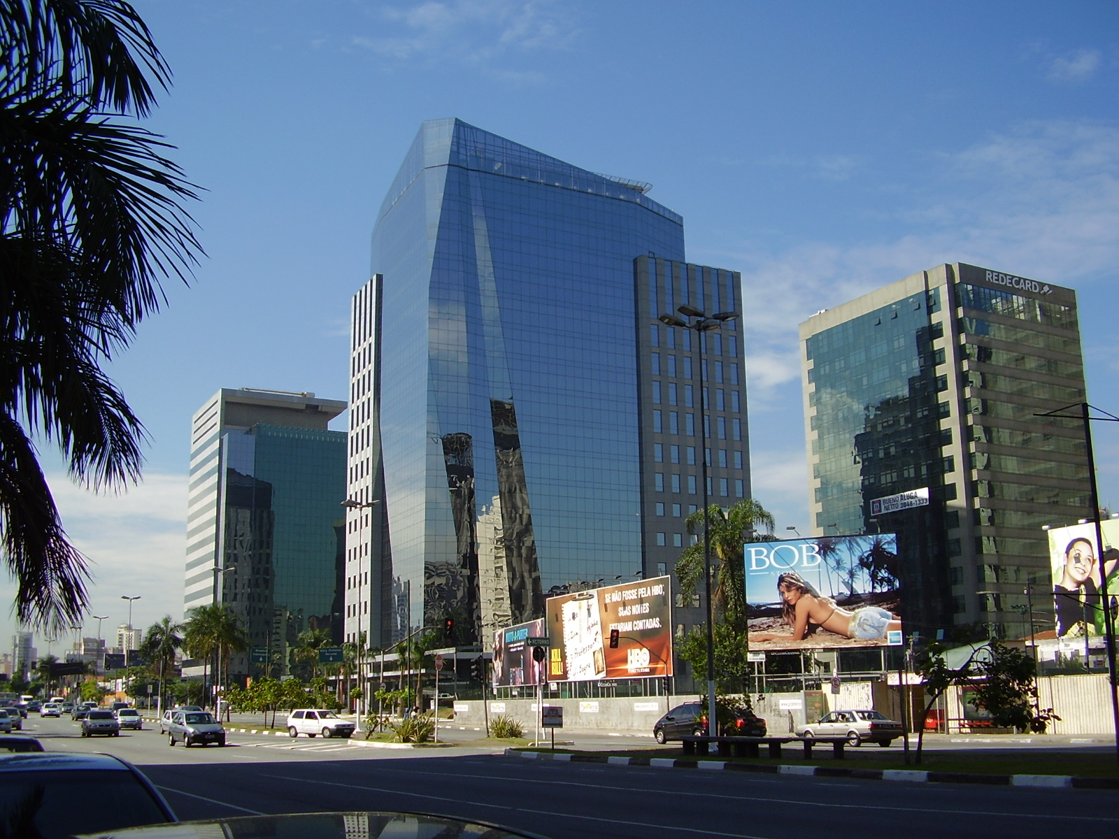 Vila Olímpia region City: São Paulo Country: Brazil Year: 2006-01-25 Category: São Paulo